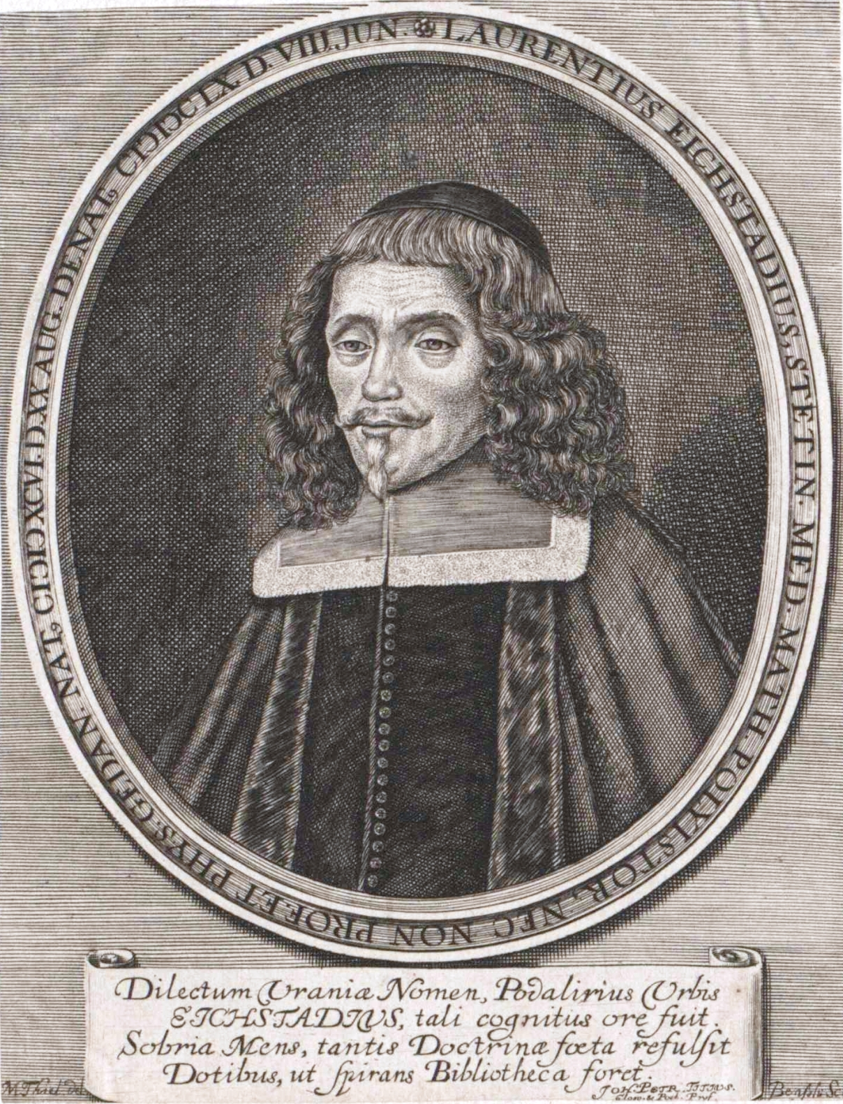 Lorenz Eichstaedt (1596–1660), Stadtphysikus in Stettin und Danzig